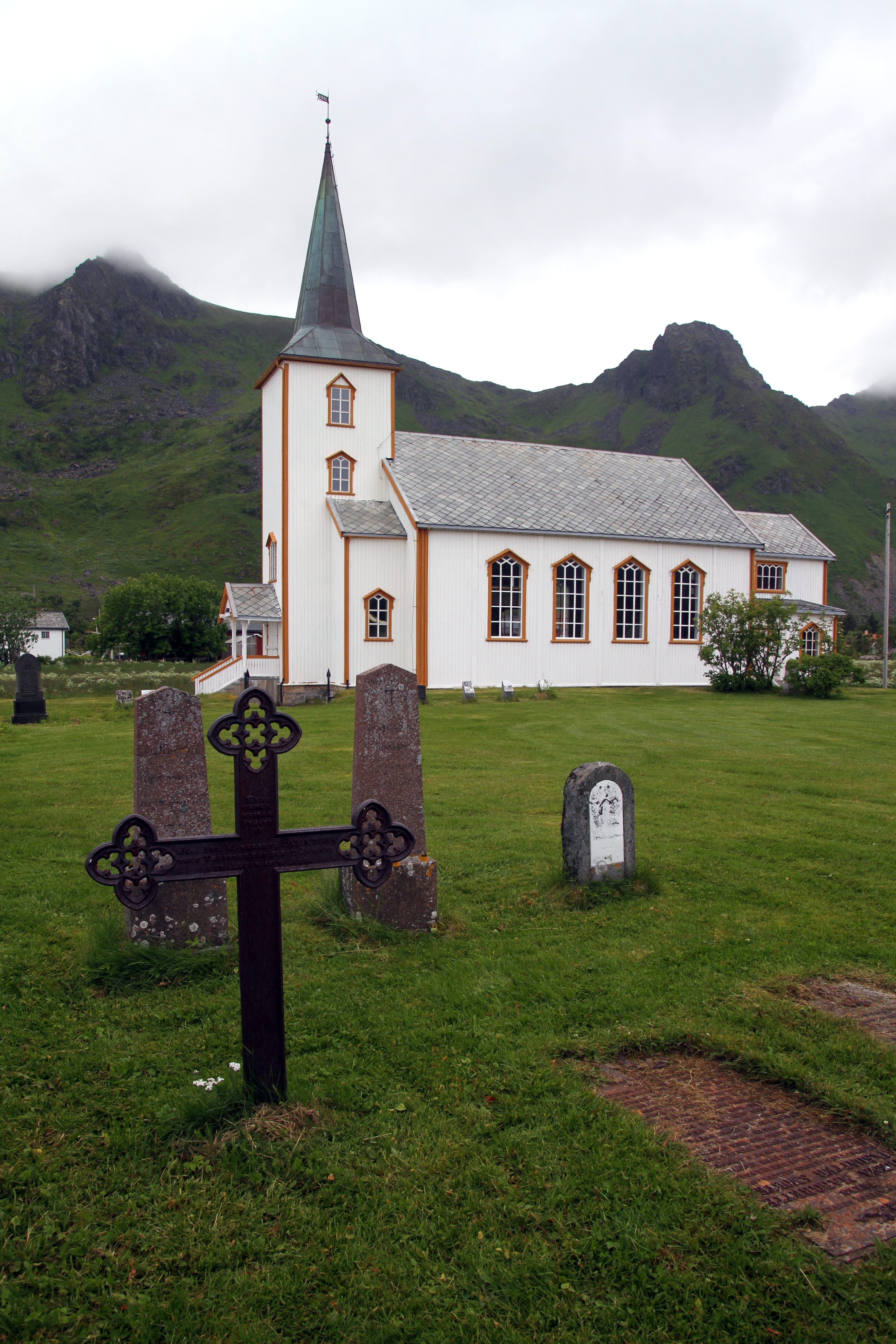 Valberg, Vestvågøy, Lofoten in Norwegen